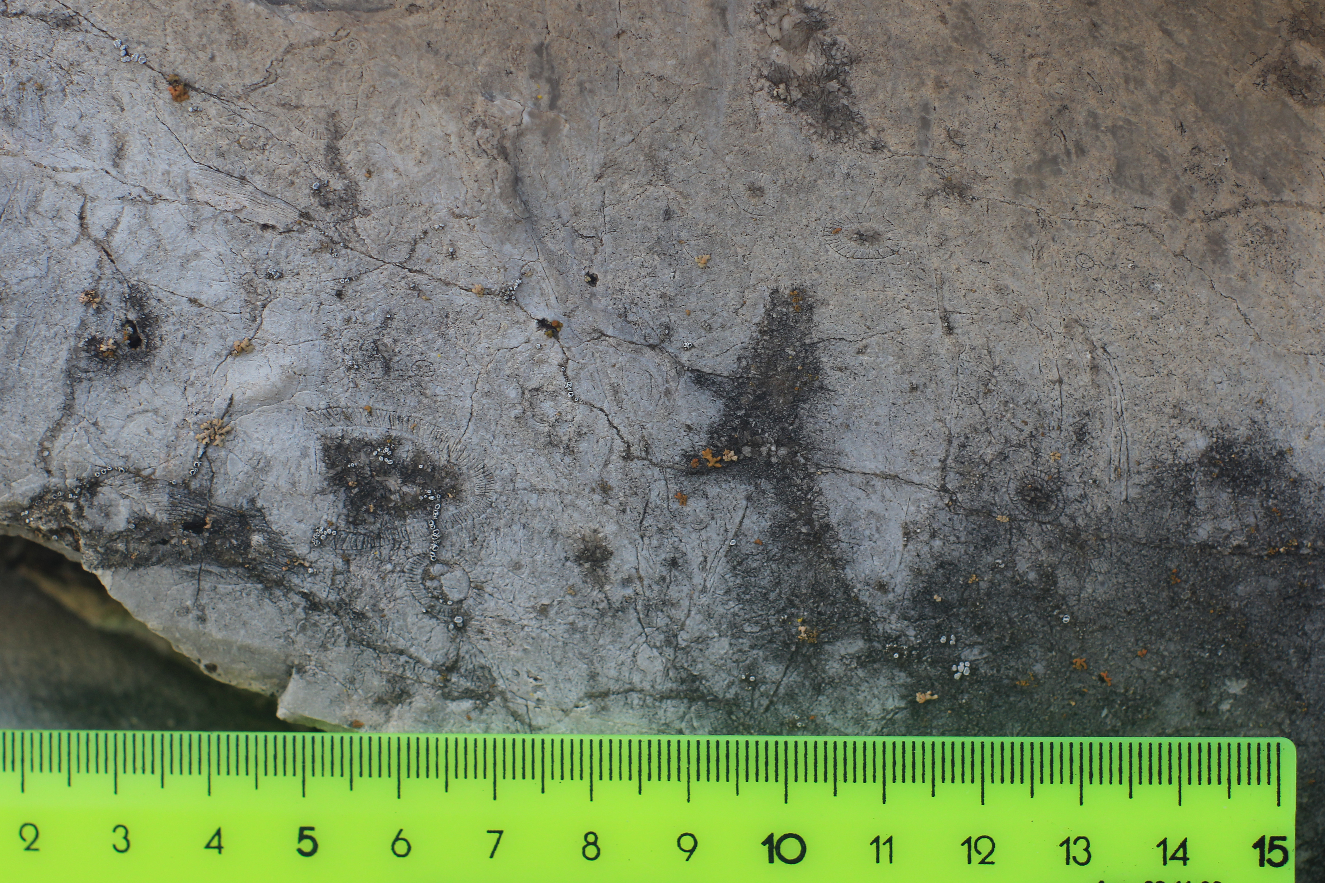 Базаихский разрез: Березовский район, Красноярский край На выветрелой поверхности торгашинских раннекембрийских известняков хорошо видны преимущественно поперечные и близкие к ним сечения кубков правильных археоциат — одних из первых скелетных организмов в истории Земли. This image is related to the protected area of Russia number 2410028